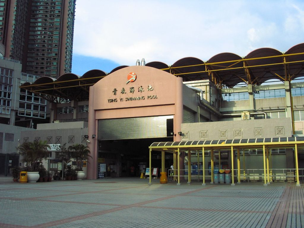 青衣游泳池 Tsing Yi Swimming Pool